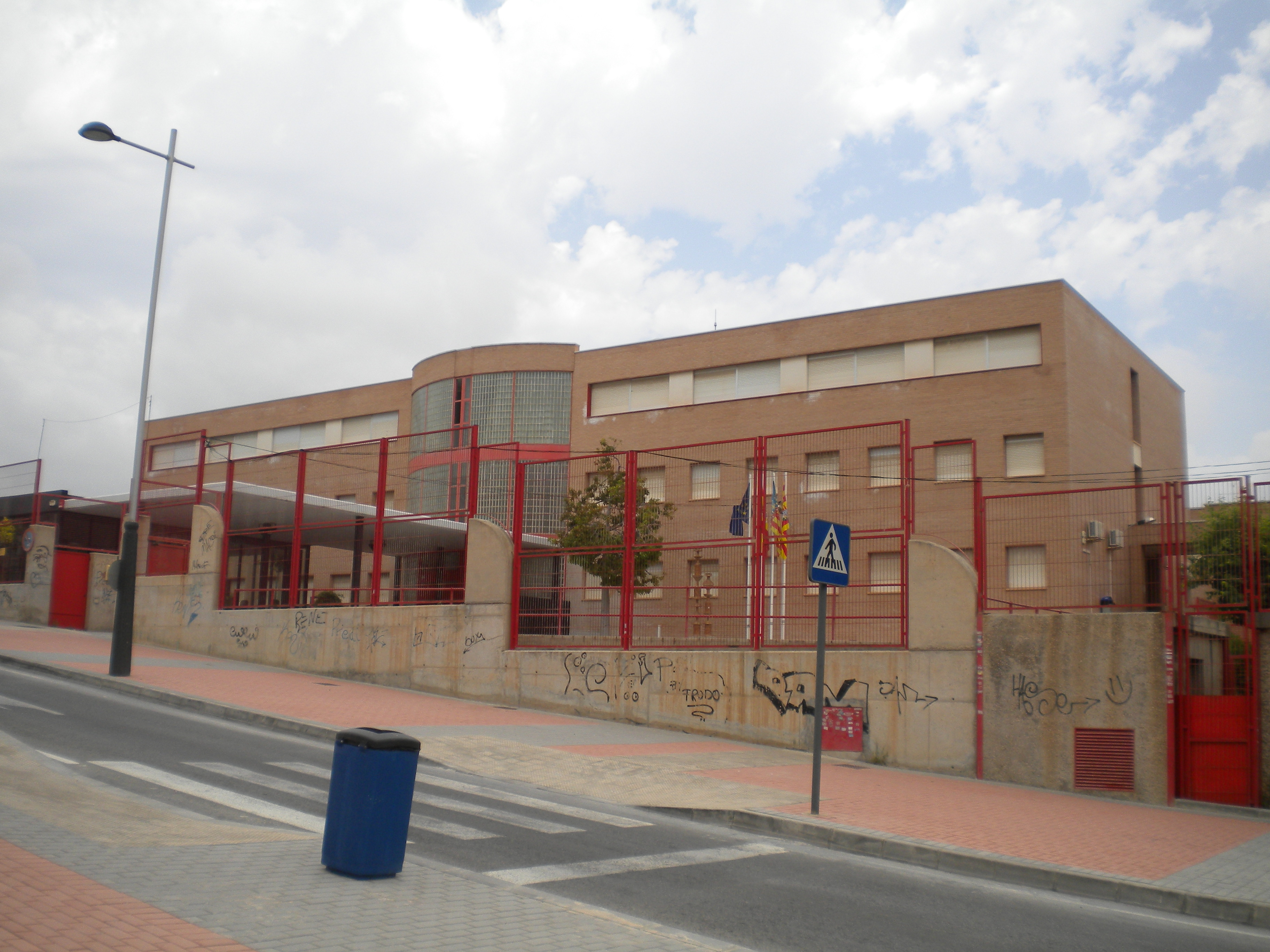 Instituto de Educación Secundaria Clot de l'illot de El Campello (Alicante)